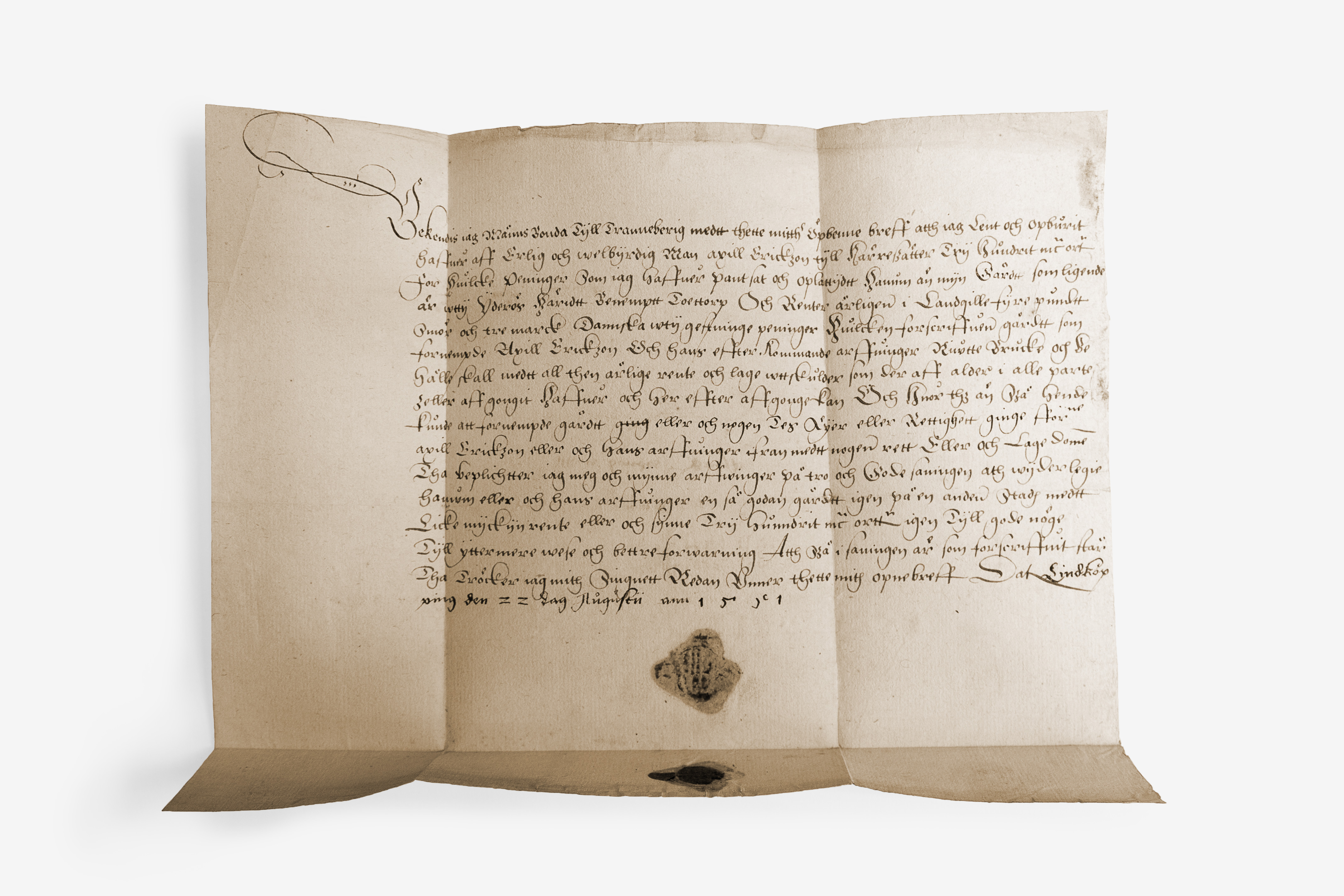 Pantbrev från den 22 augusti 1551 där adelsmannen Måns Bonde till Traneberg pantsätter gården Tovarp (Asby socken, Östergötland) till riksrådet Axel Eriksson (Bielke) för 300 mark.